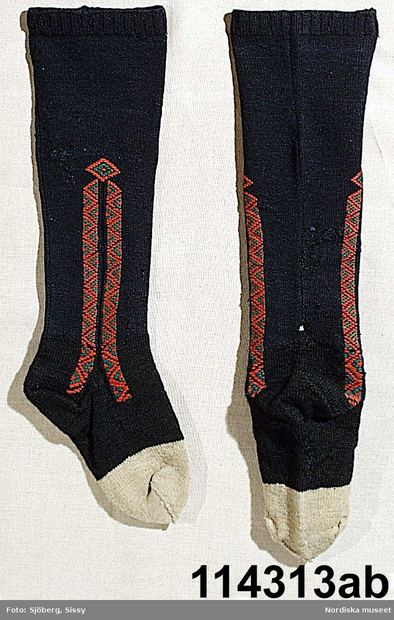 Strumpor